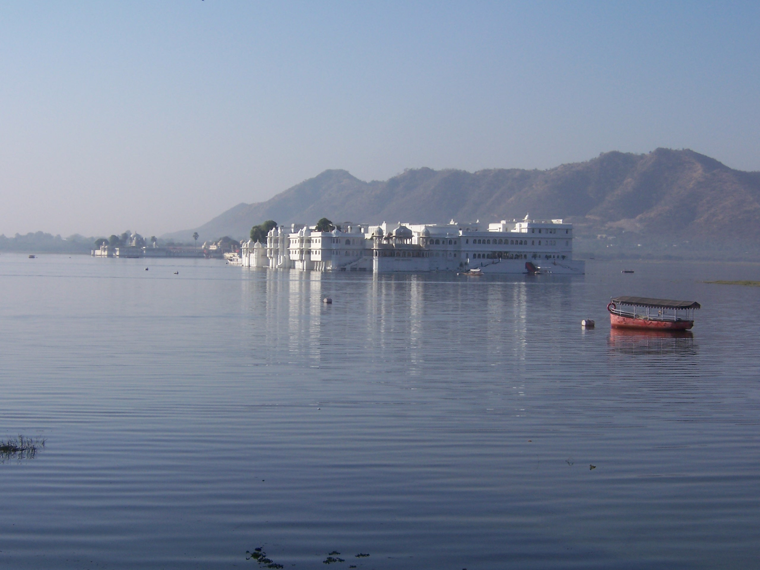 Udaipur Lake Palace